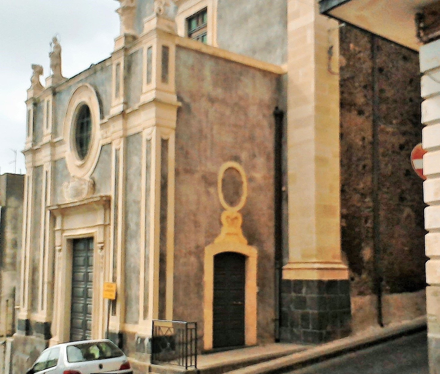 La chiesa di San Giuseppe - Misterbianco.jpg